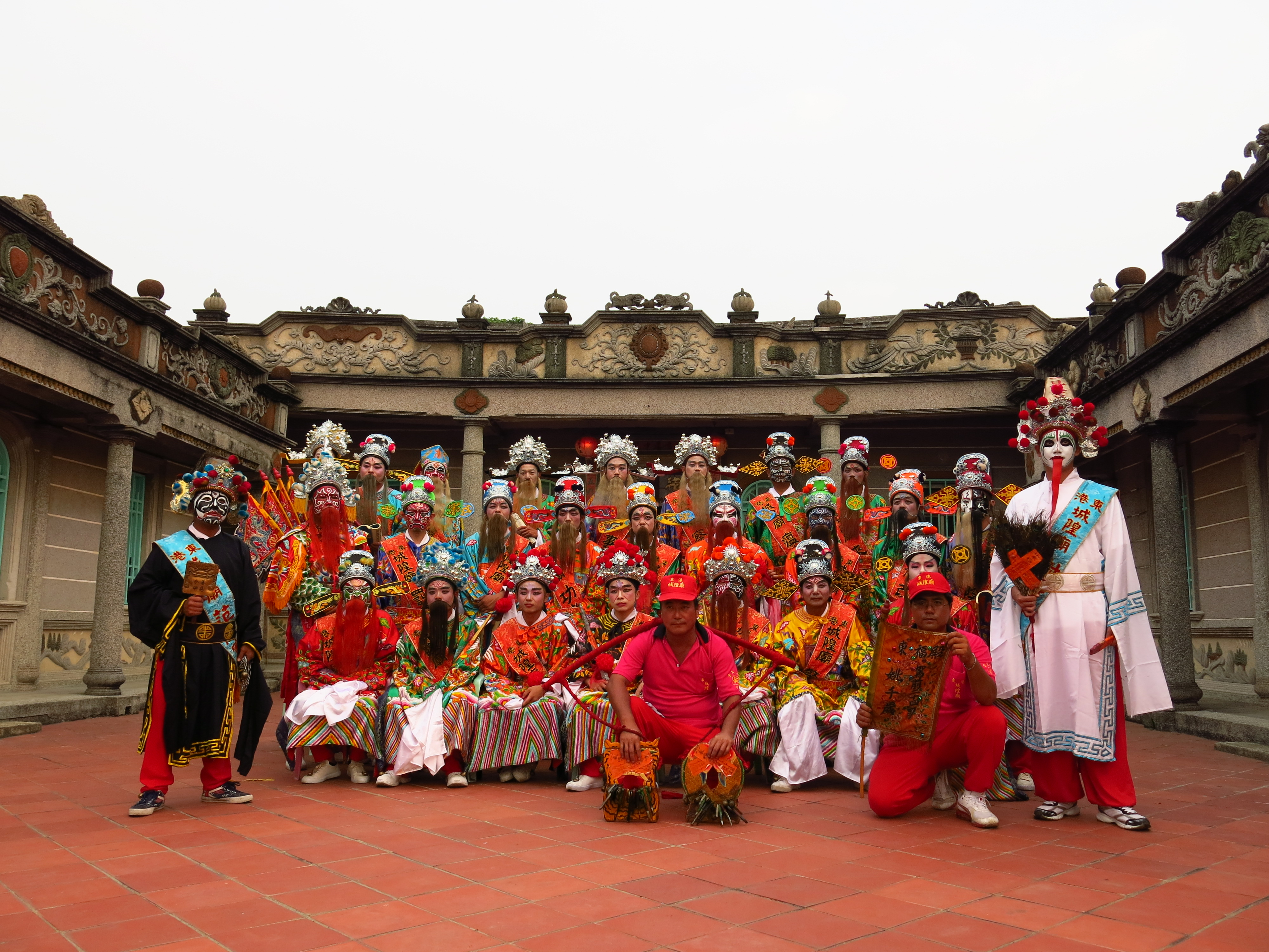 東港鳳邑二十四司